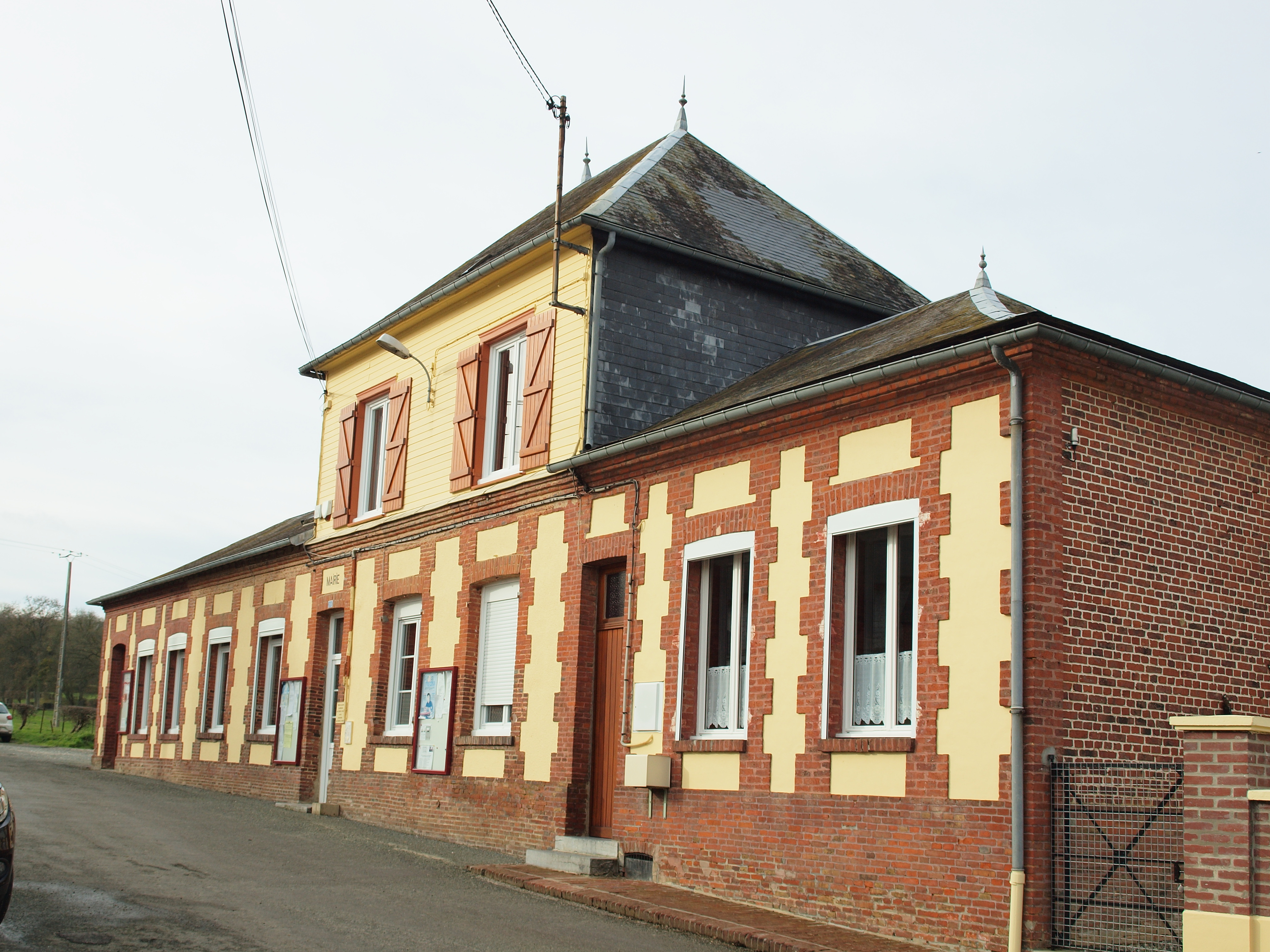 Quincampoix-Fleuzy (Oise, France)